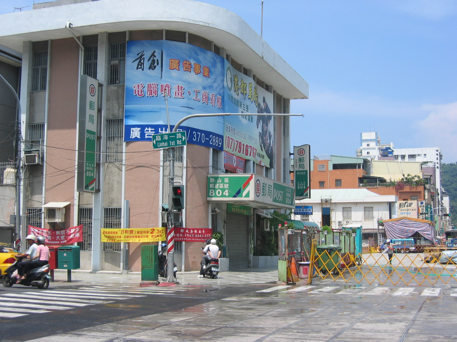 中文（台灣）: 今日的打狗郵便局。